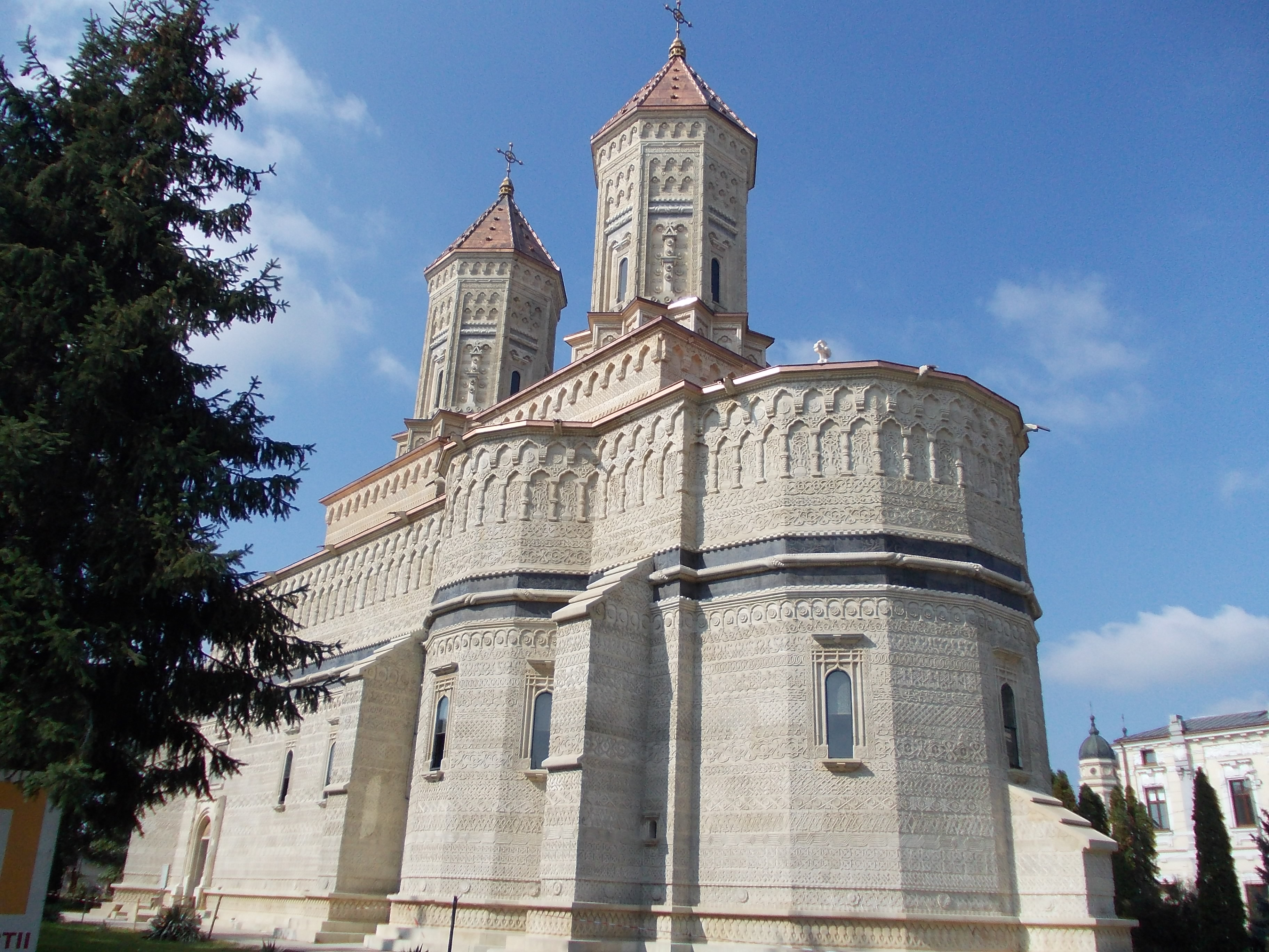 Biserica "Sf. Trei Ierarhi" 01